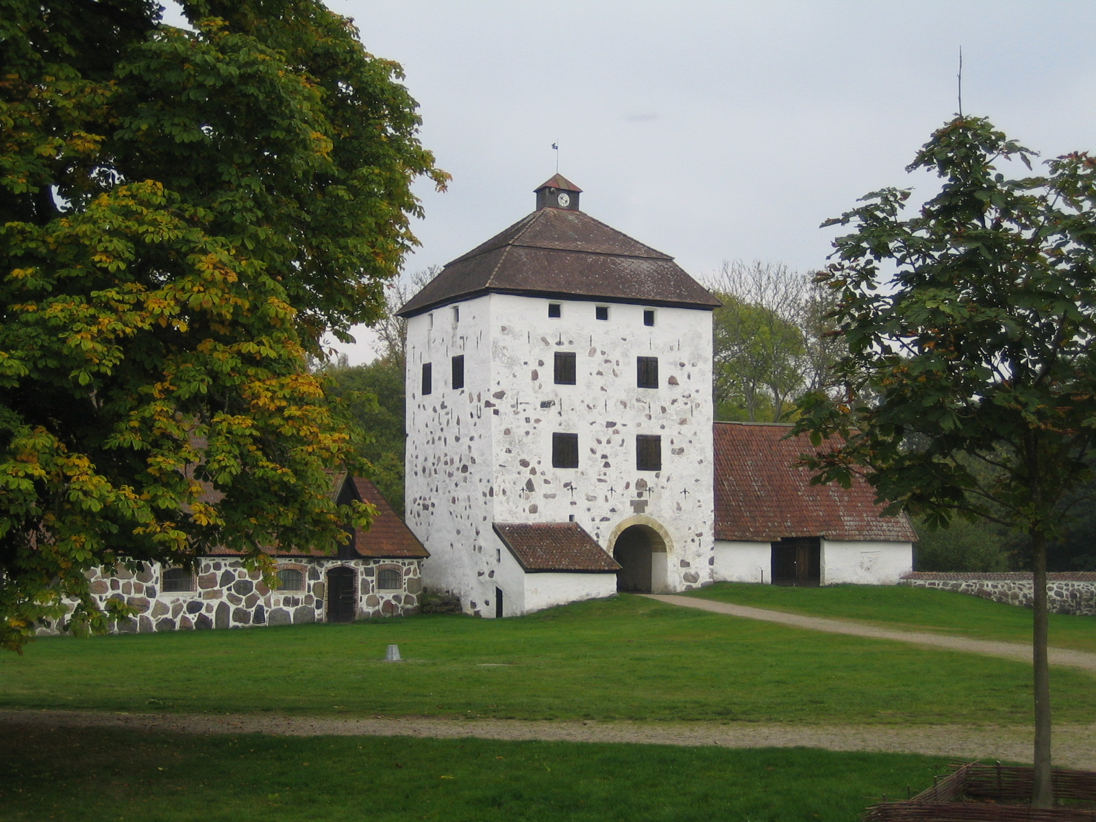 Hovdala slott, porttornet. Bilden tagen av mig själv 9 oktober 2005.